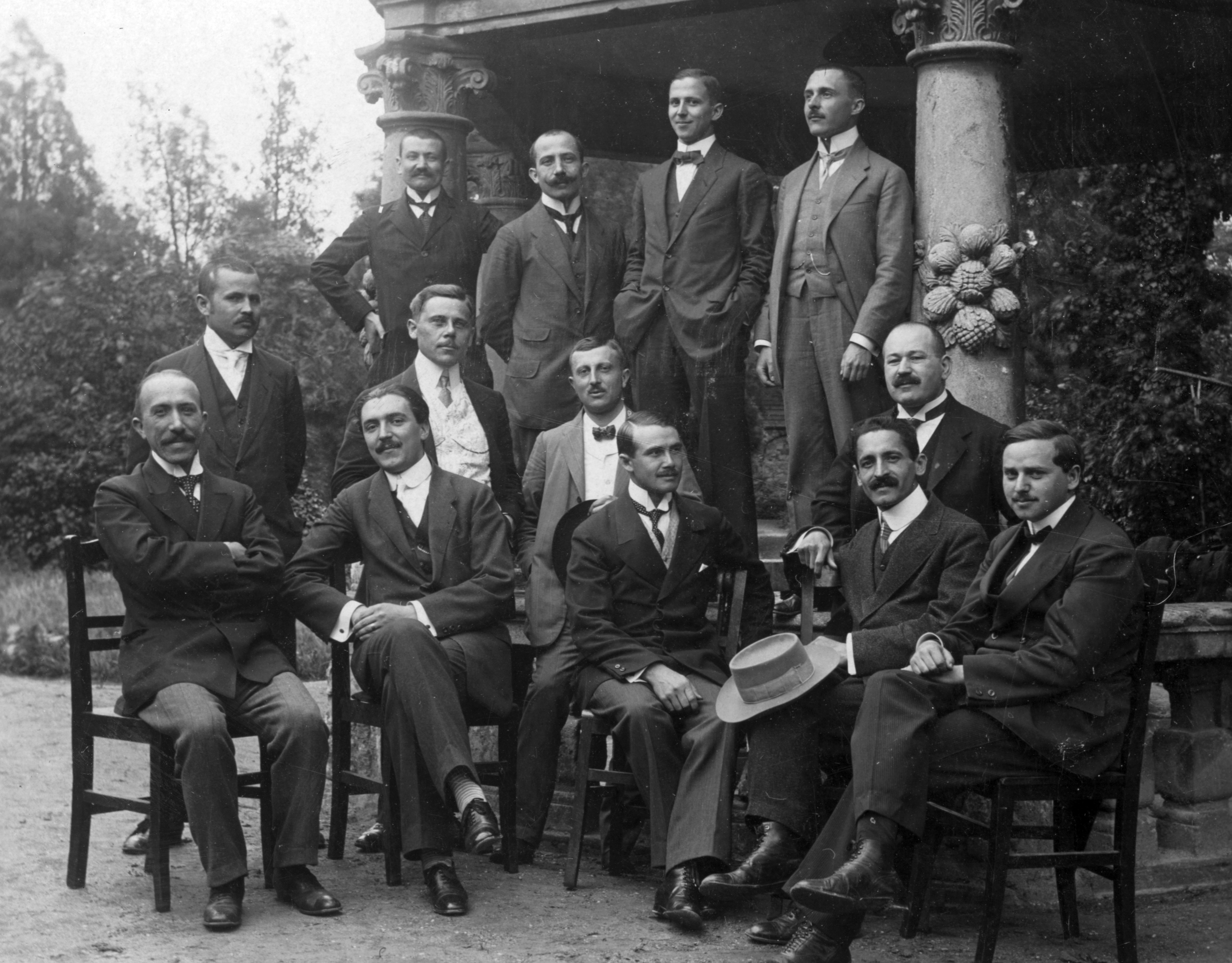 Sopron, az Evangélikus Líceum végzősei tanáraikkal Location: Sopron, Hungary Tags: tableau, men, garden Title: Sopron, Széchenyi tér, az Evangélikus Líceum kertjében lévő temető, háttérben a Gálffy-kripta.